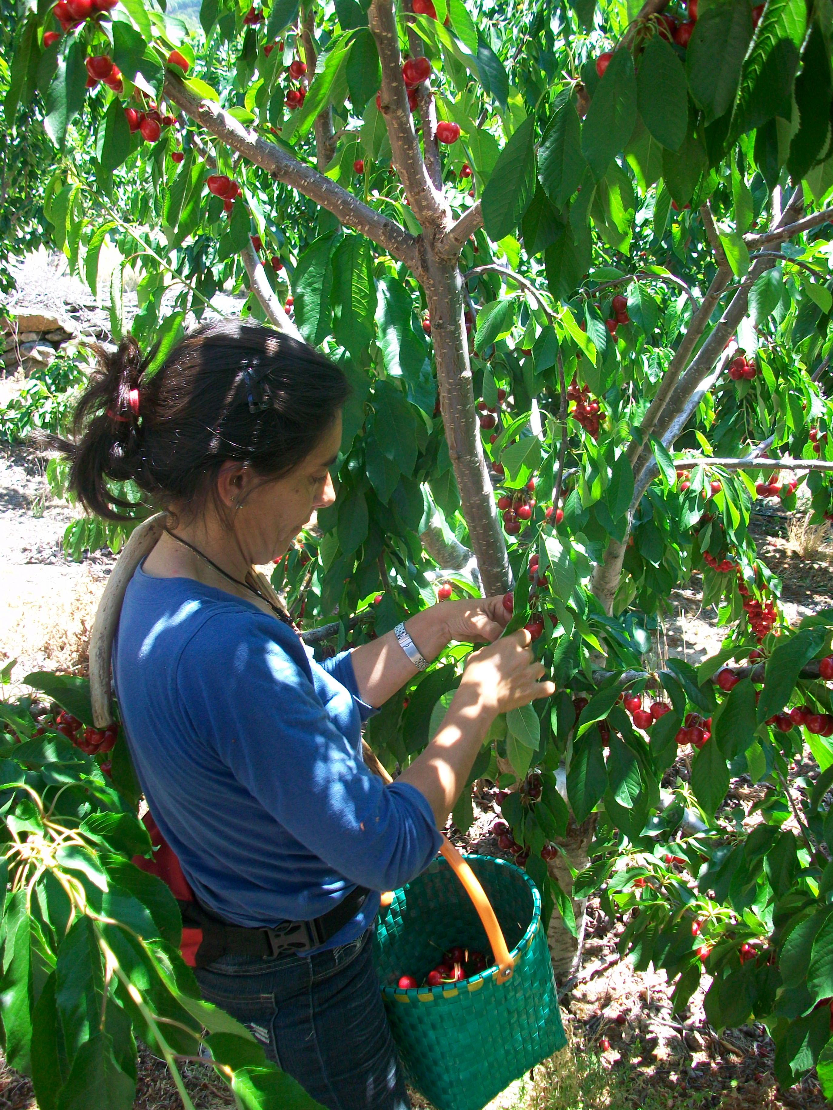 Mujer barraeña recolectando cerezas.